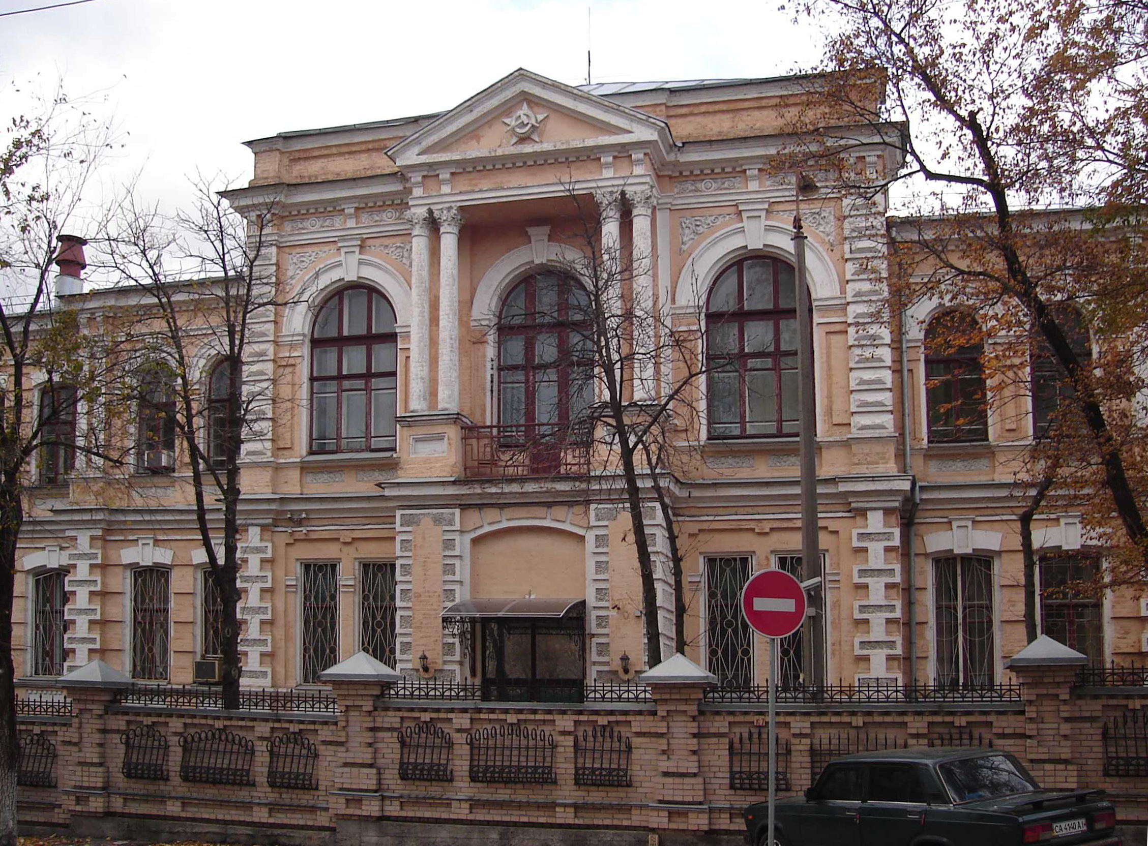 Бывшее здание 4-й гимназии в Киеве